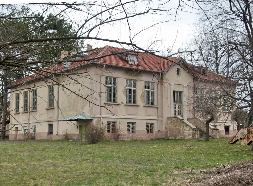 Село Берковски, община Попово. Сградата на вече бившето училище в селото.